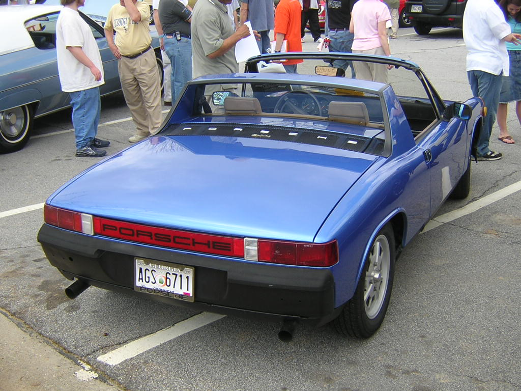 Porsche 914 - rear view